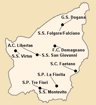 Répartition des clubs en Serie A1 1988-1989.